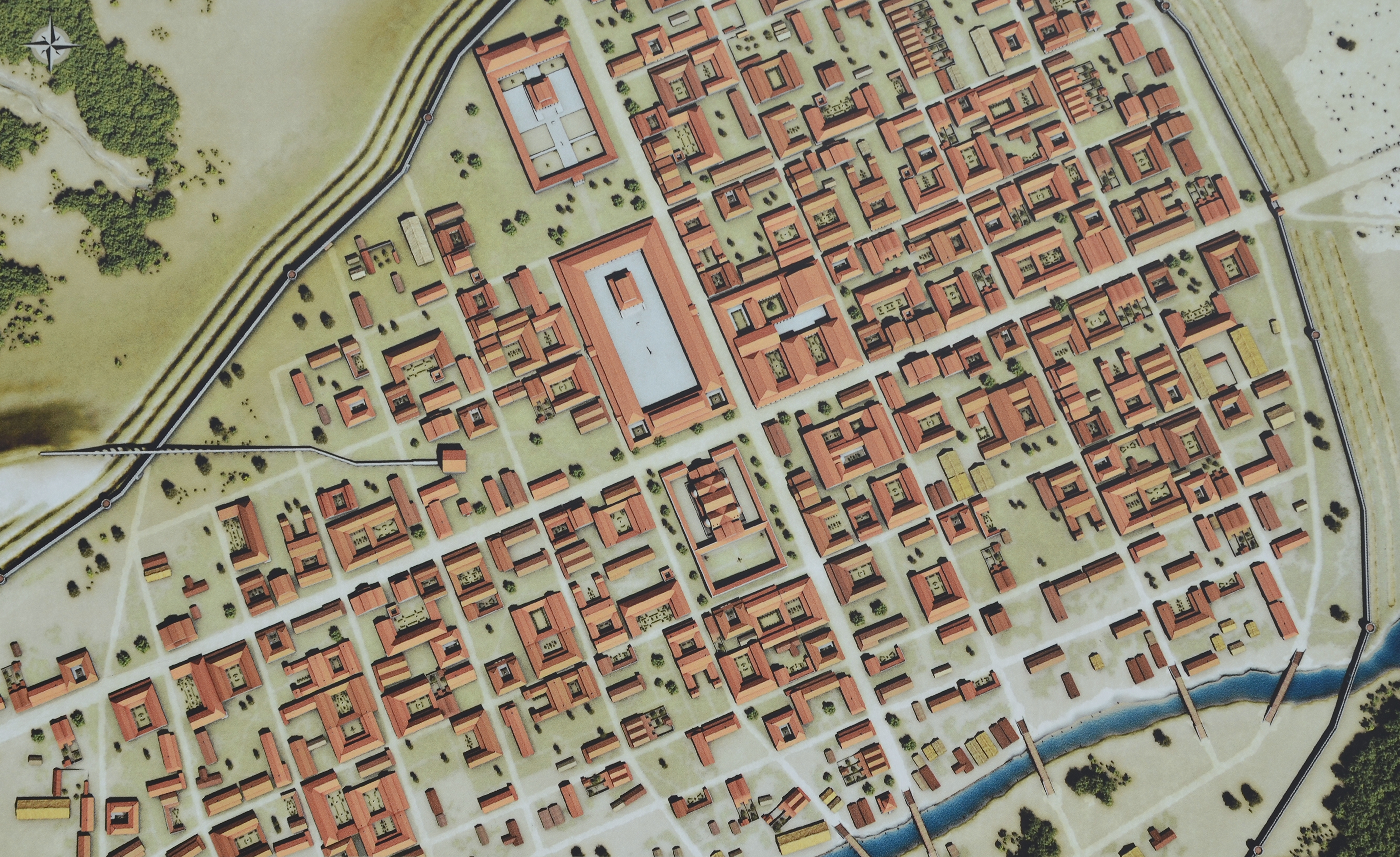 Atuatuca Tungrorum, Tongeren, Belgium